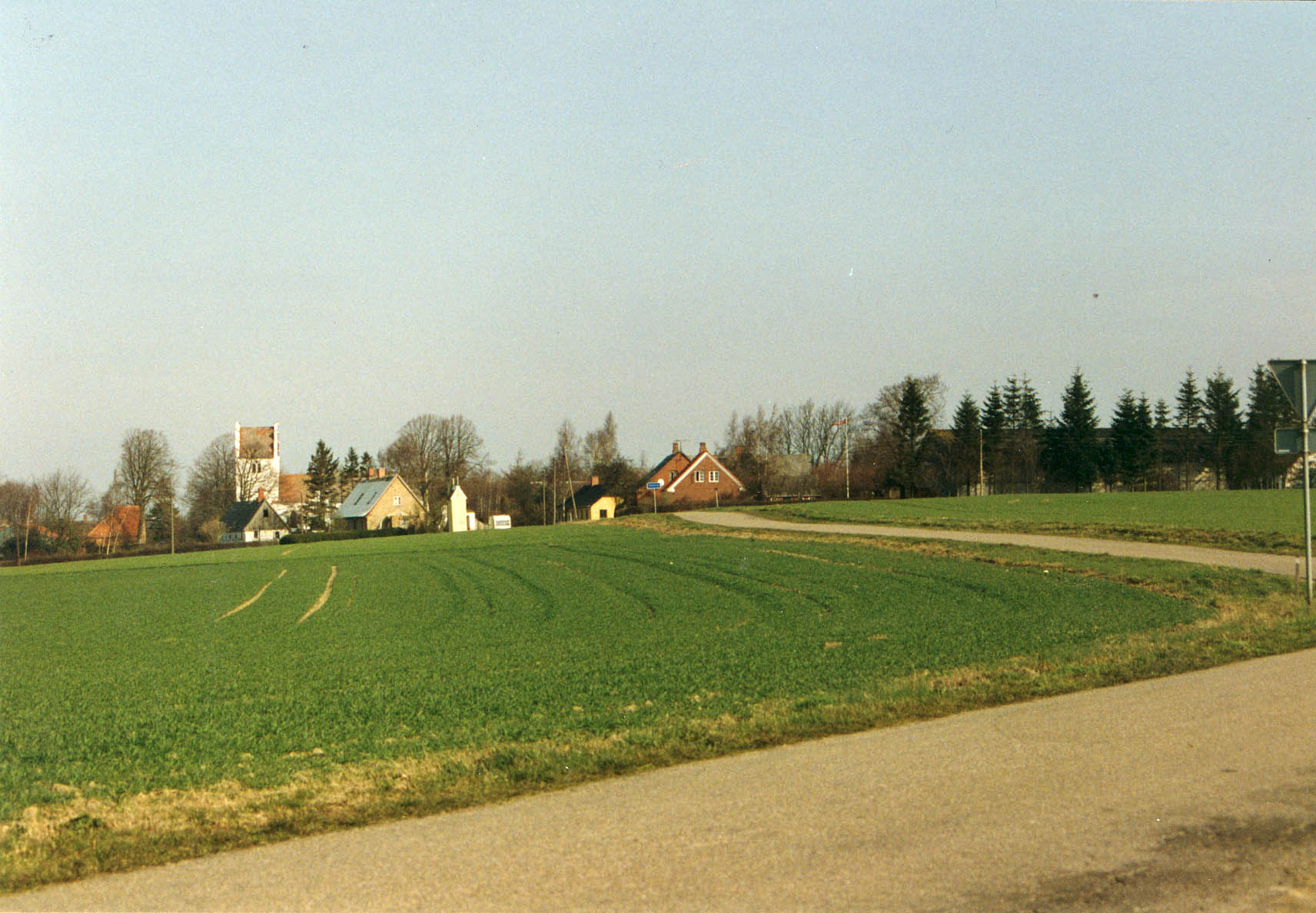 Smerup set fra syd